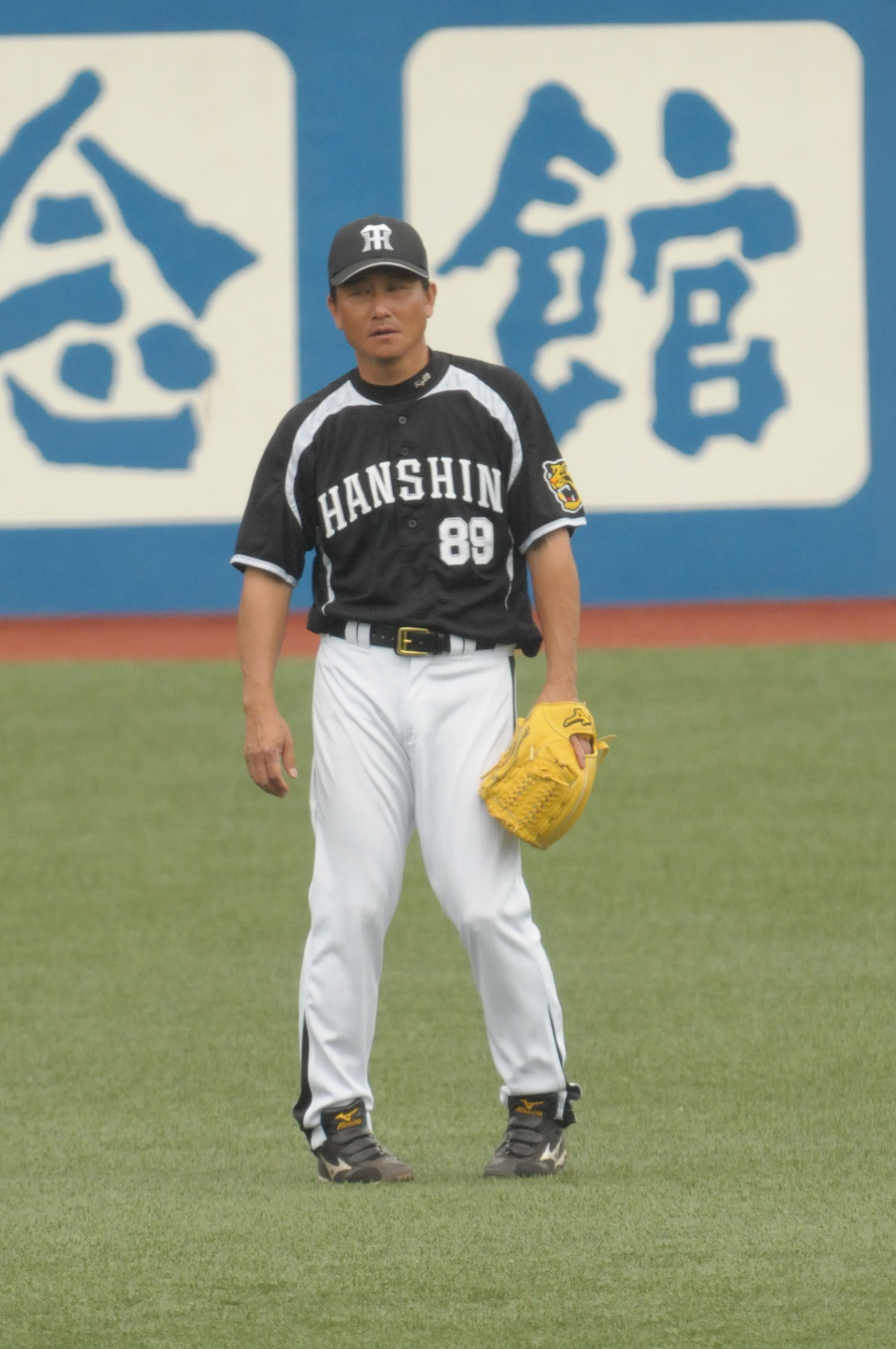 阪神タイガース、山脇光治コーチ。神宮球場で。